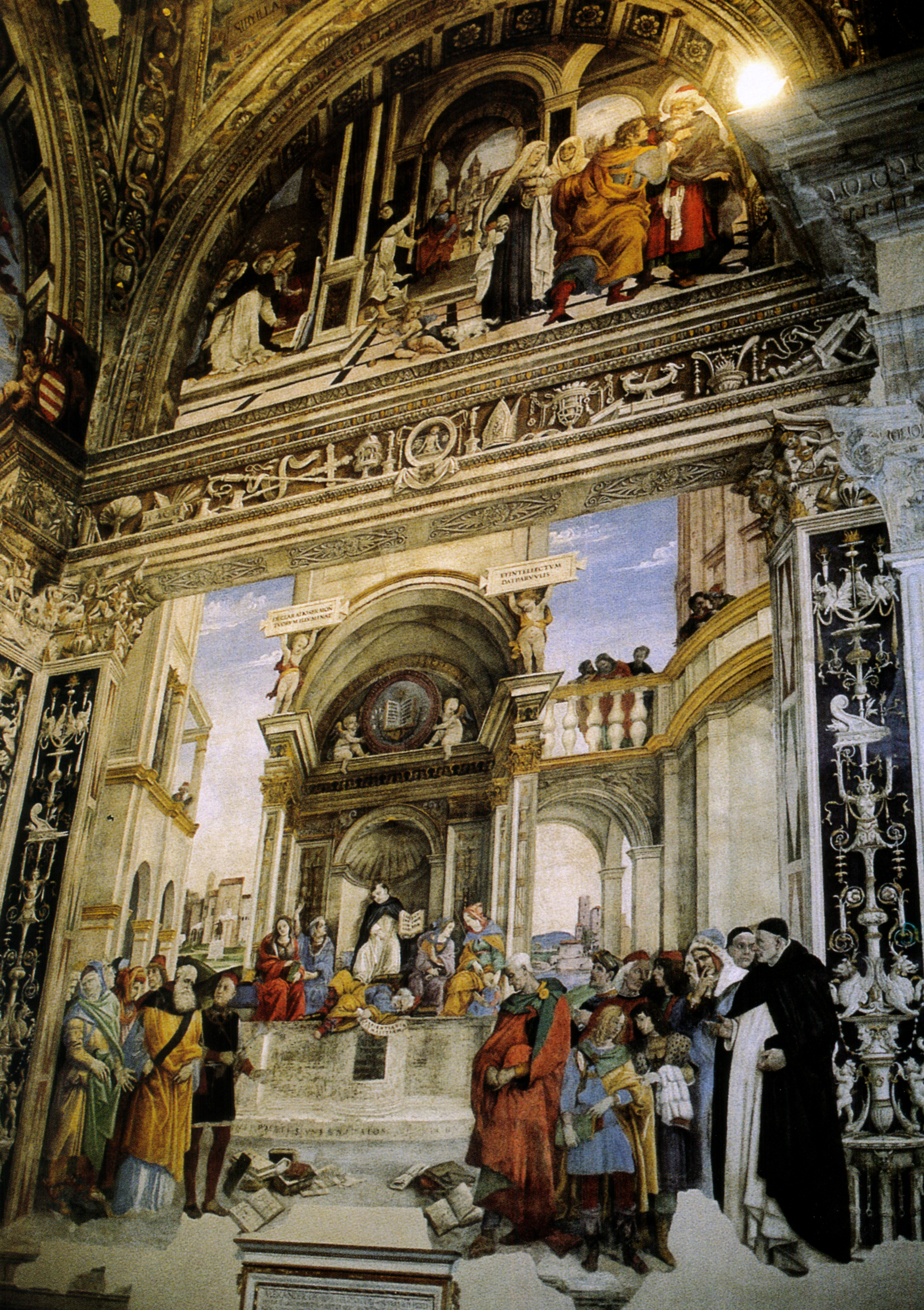 LIPPI, Filippino Assumption and Annunciation Fresco Santa Maria sopra Minerva, Rome